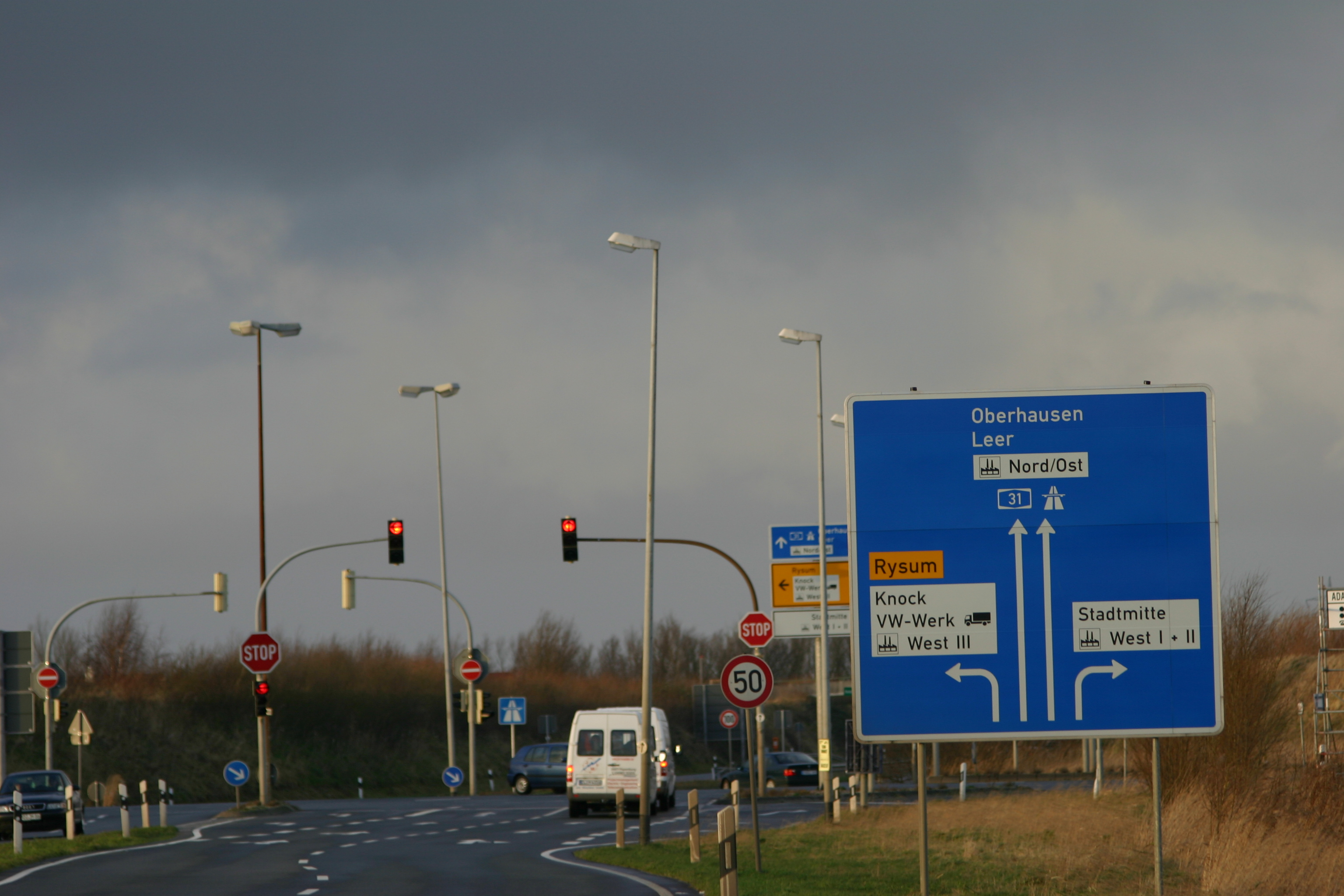 Beginn der Autobahn A 31 in Emden (Abfahrt Emden-West, laufende Abfahrt-Nummer 1)